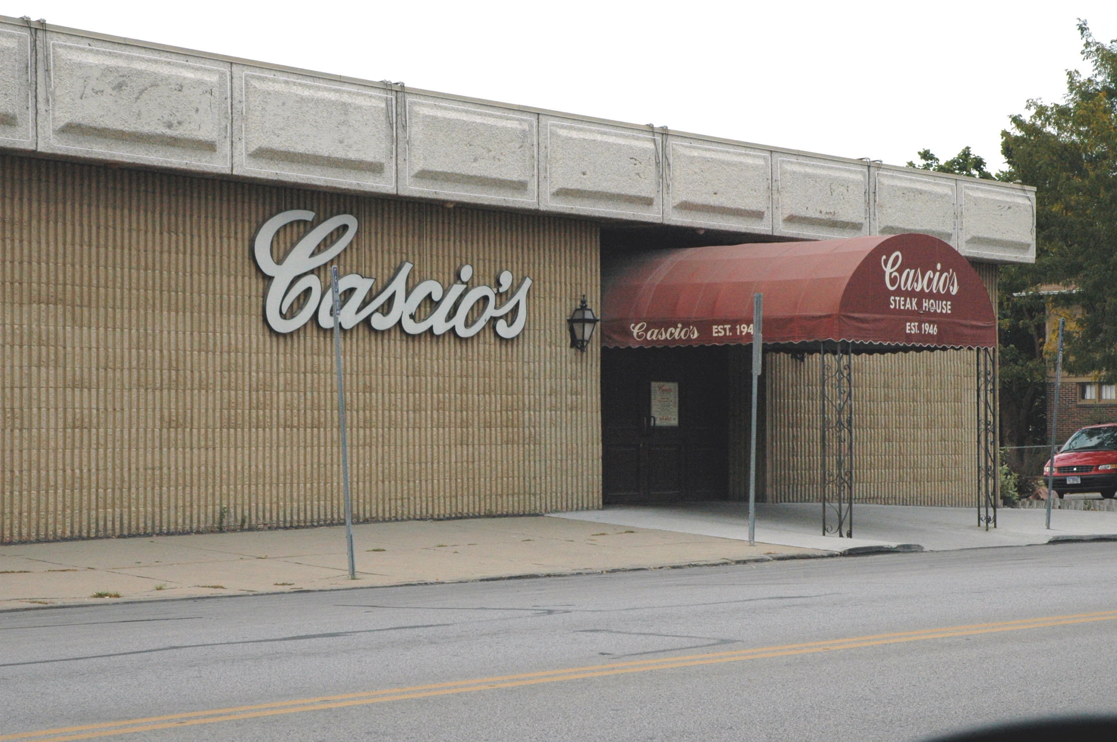 Cascio's Restaurant in Omaha, Nebraska.